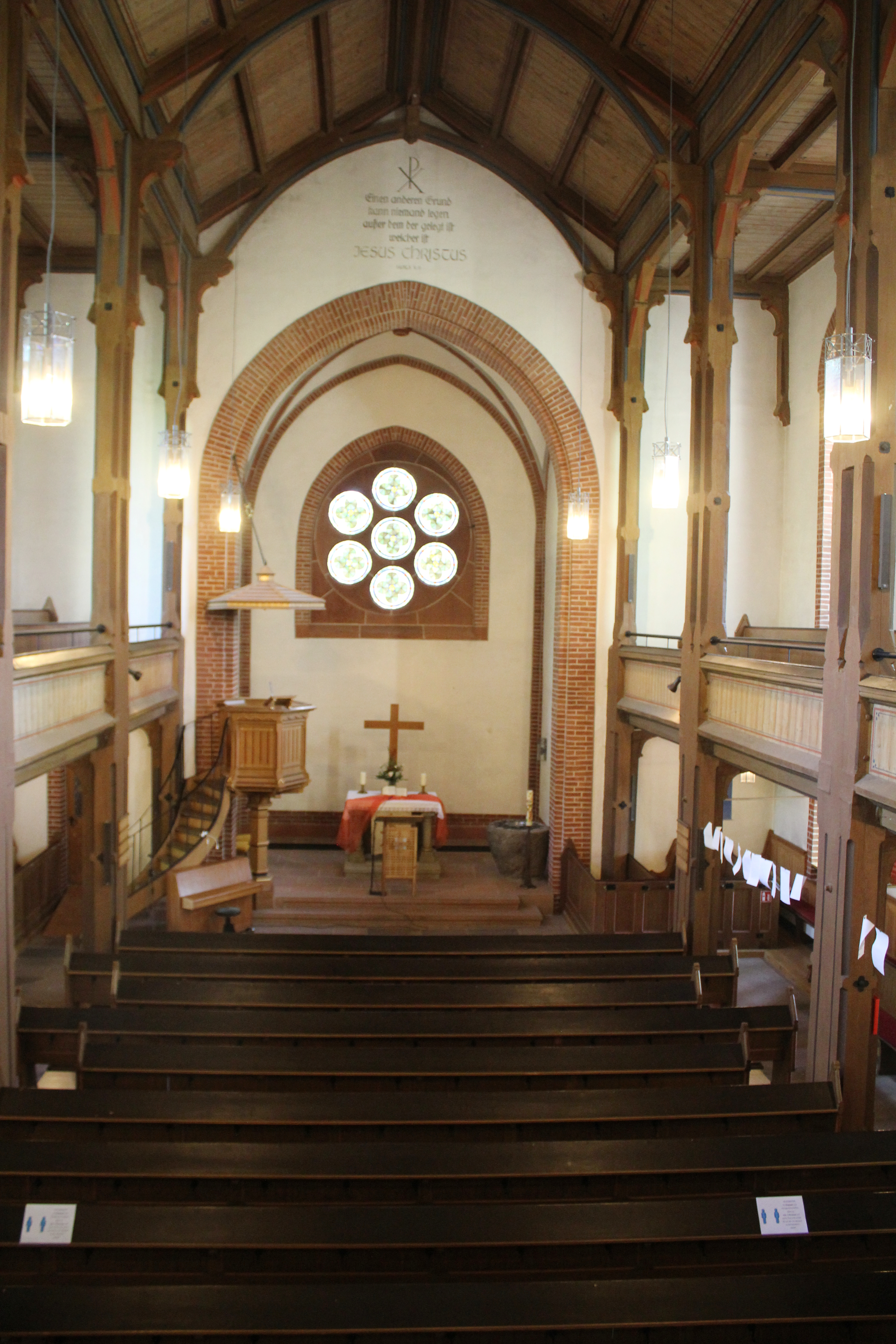 Evangelische Kirche Burgsolms, Solms, Lahn-Dill-Kreis, Hessen, Deutschland